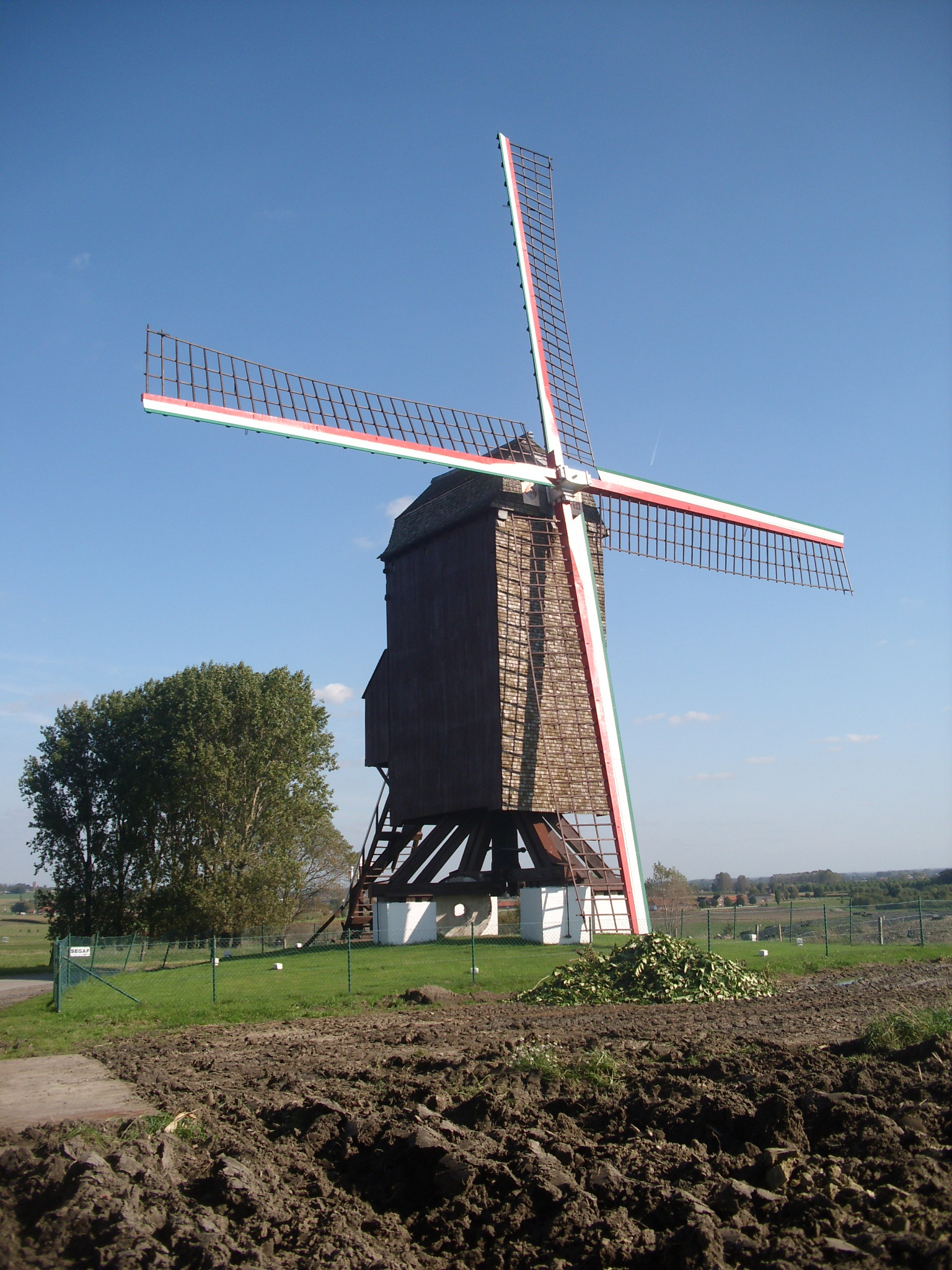 Poelbergmolen - Woestijnbosstraat - Tielt - West-Vlaanderen - België